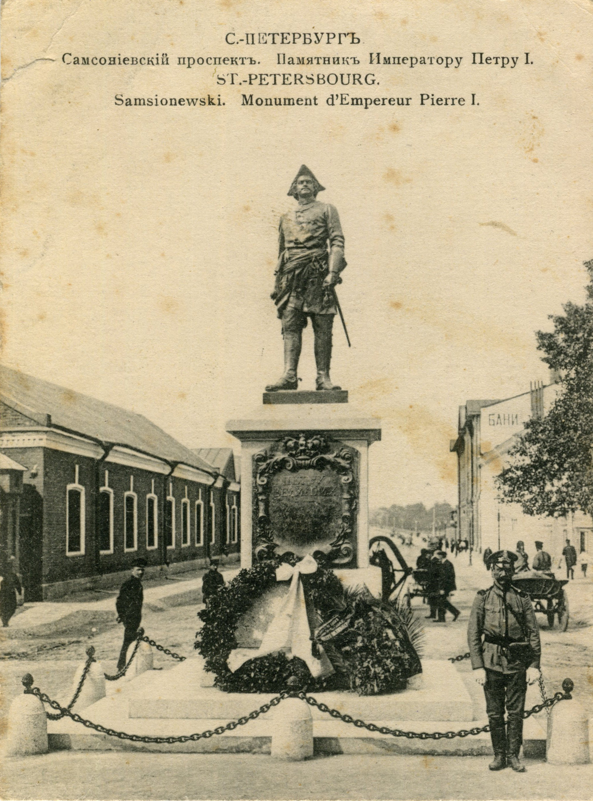 Санкт-Петербург. Открытка начала XX века.